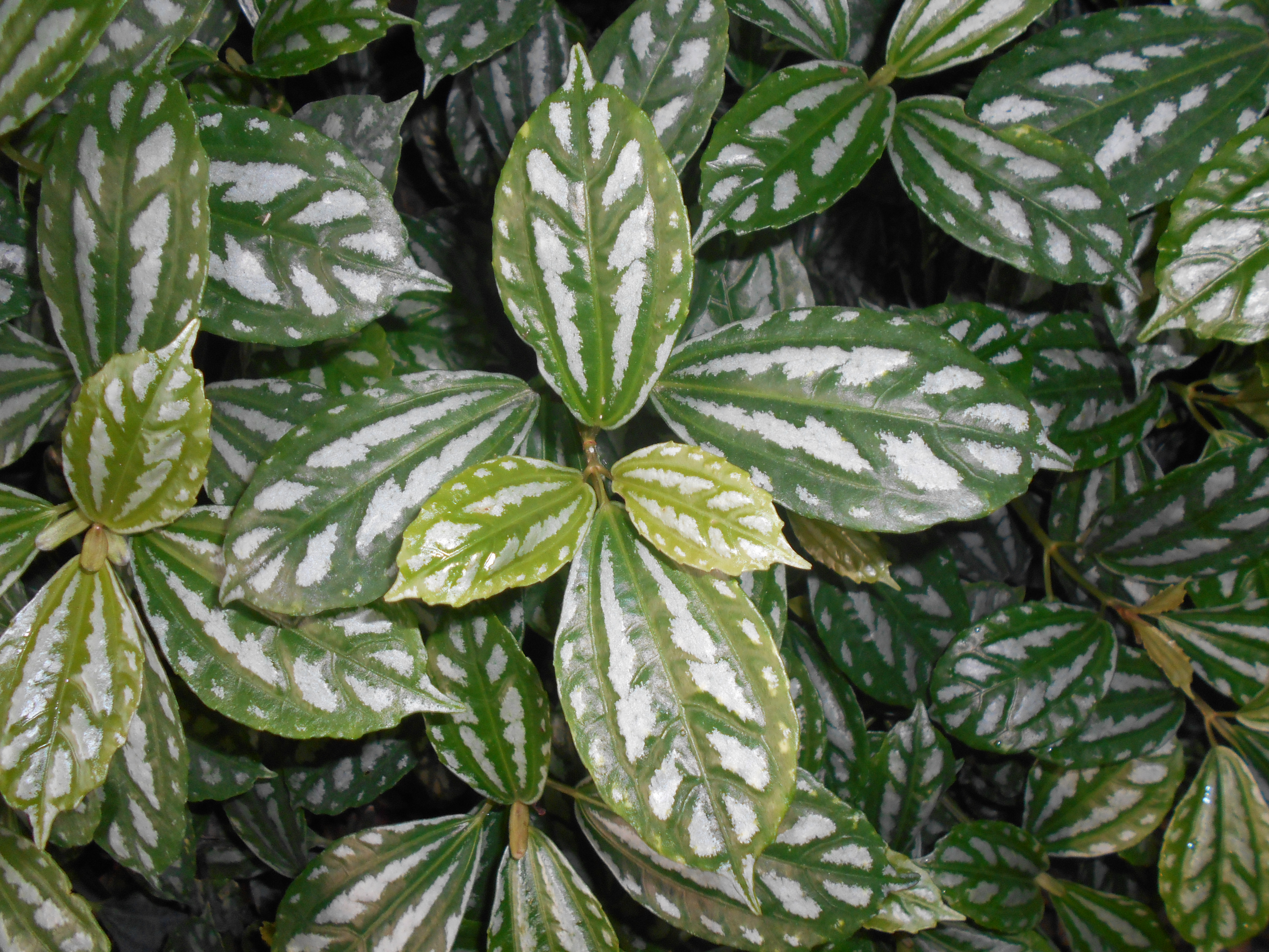 Pilea Cadiera (Pilea cadierei), Ogród Botaniczny PAN w Warszawie.